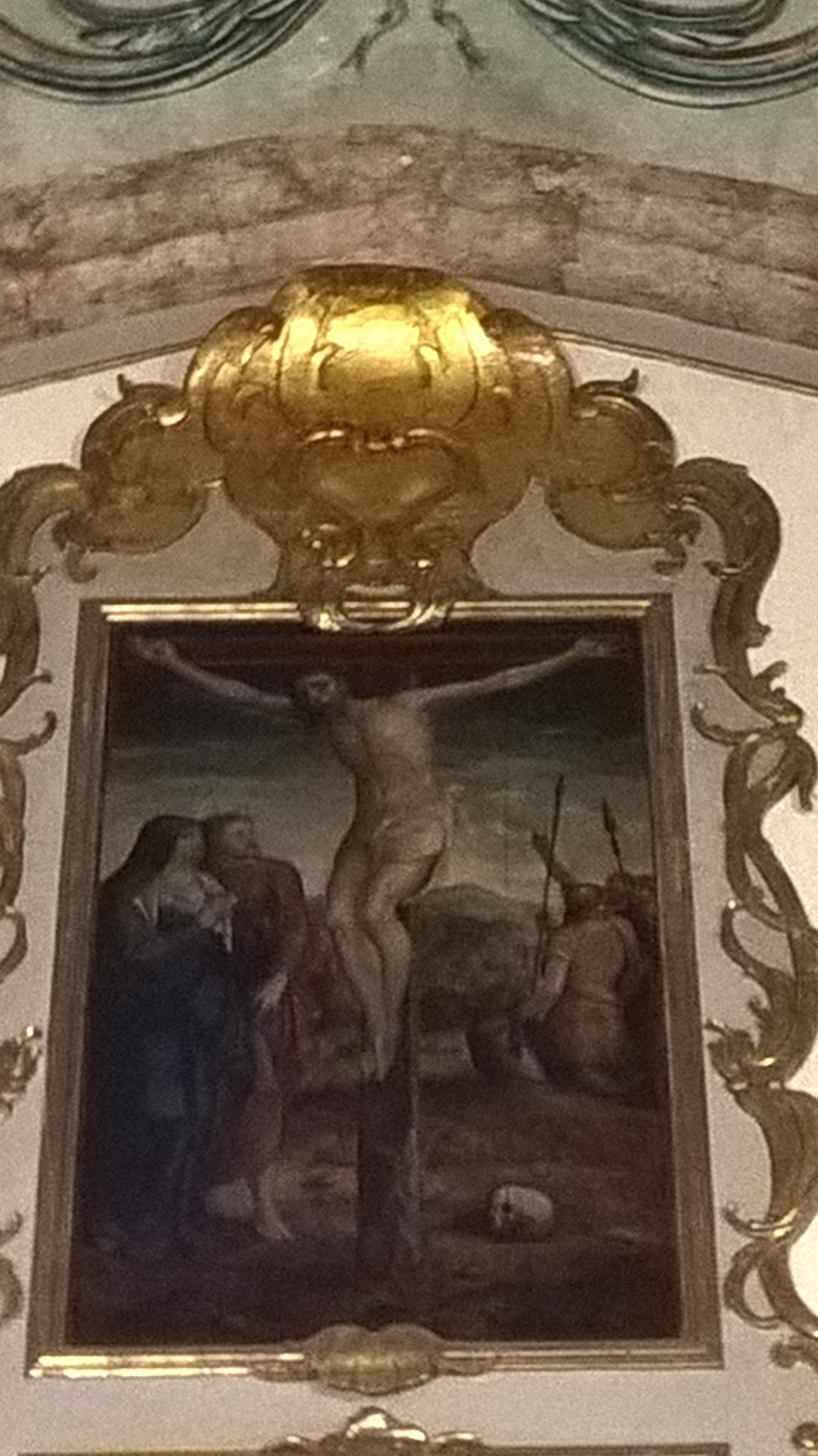 Calvário do Políptico da Matriz de Santa Cruz